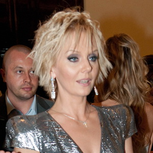 Певица Валерия на церемонии Top Beauty Awards 2010 в отеле «The Ritz-Carlton» 19 мая 2010 года